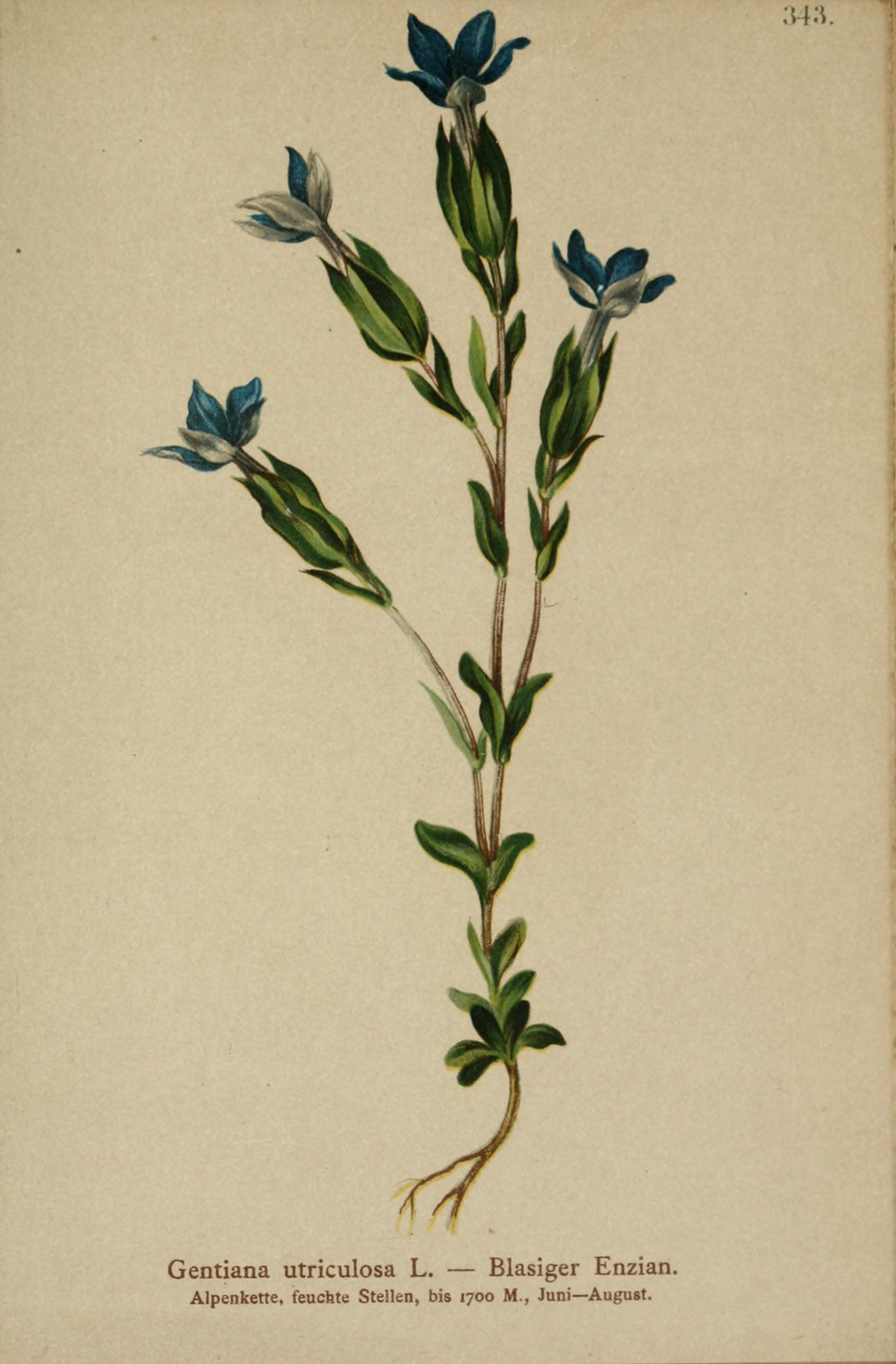 Atlas der Alpenflora / herausgegeben vom Deutschen und Oesterreichischen Alpenverein ; nach der Natur gemalt von Anton Hartinger ; mit Text von K.W. v. Dalla Torre.